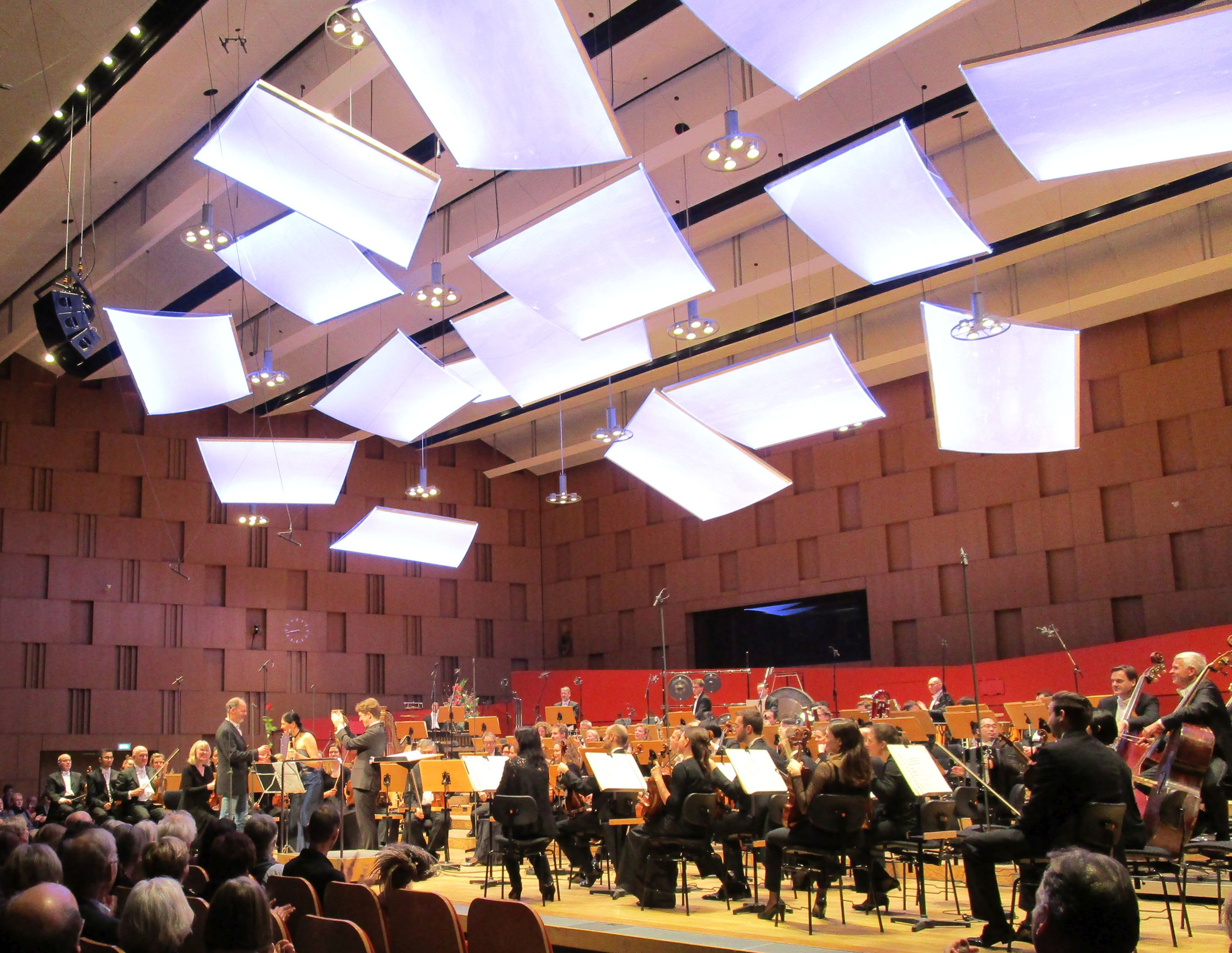 Das Konzert für Klarinette und Orchester (2018) von Thorsten Encke ist ein Auftragswerk des Norddeutschen Rundfunks. Die Uraufführung gestalteten die Klarinettistin Sharon Kam und die NDR Radiophilharmonie unter dem Dirigat von Joshua Weilerstein am 10. Januar 2019 im Großen Sendesaal des NDR-Funkhauses in Hannover. Am folgenden Tag, dem 11. Januar 2019, führten sie das Werk erneut auf. Der Komponist überreicht Sharon Kam eine Rose.